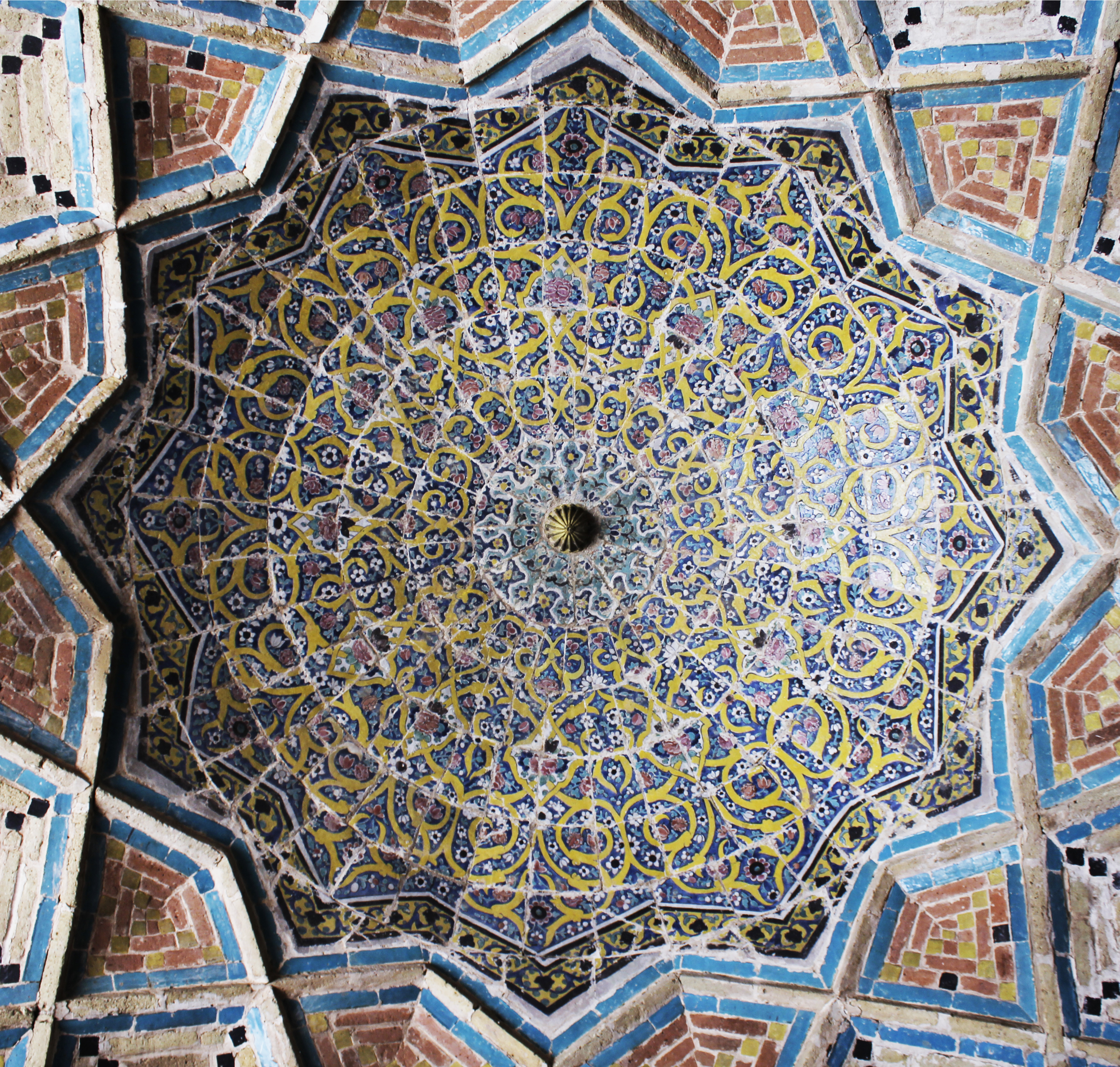 مجموعه بناهای سردار، مدرسه و مسجد و آب‌انبار